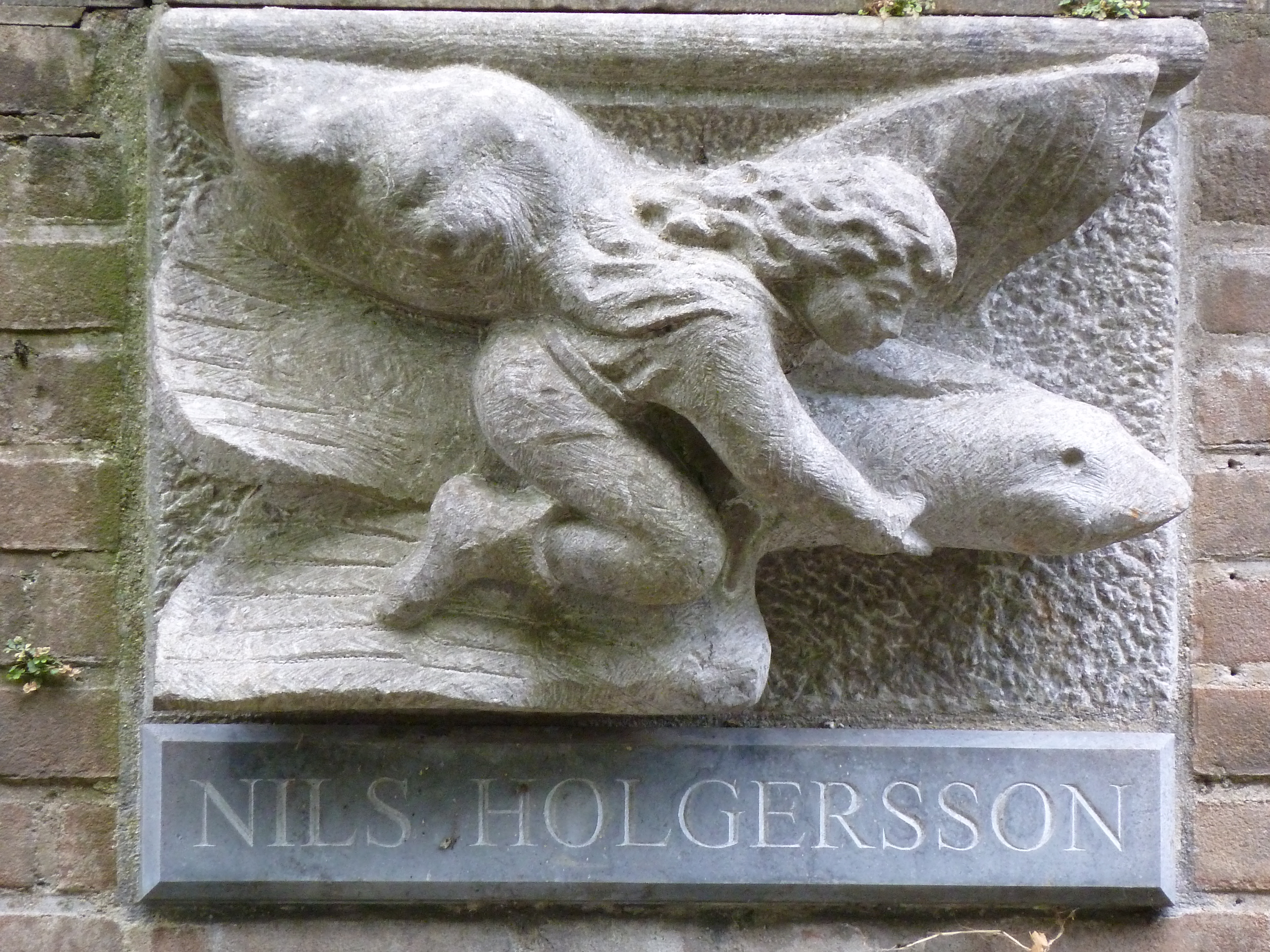 Straatlantaarnconsole Drift 9, Utrecht, NL. Nils Holgersson.